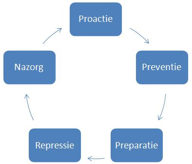 De veiligheidsketen